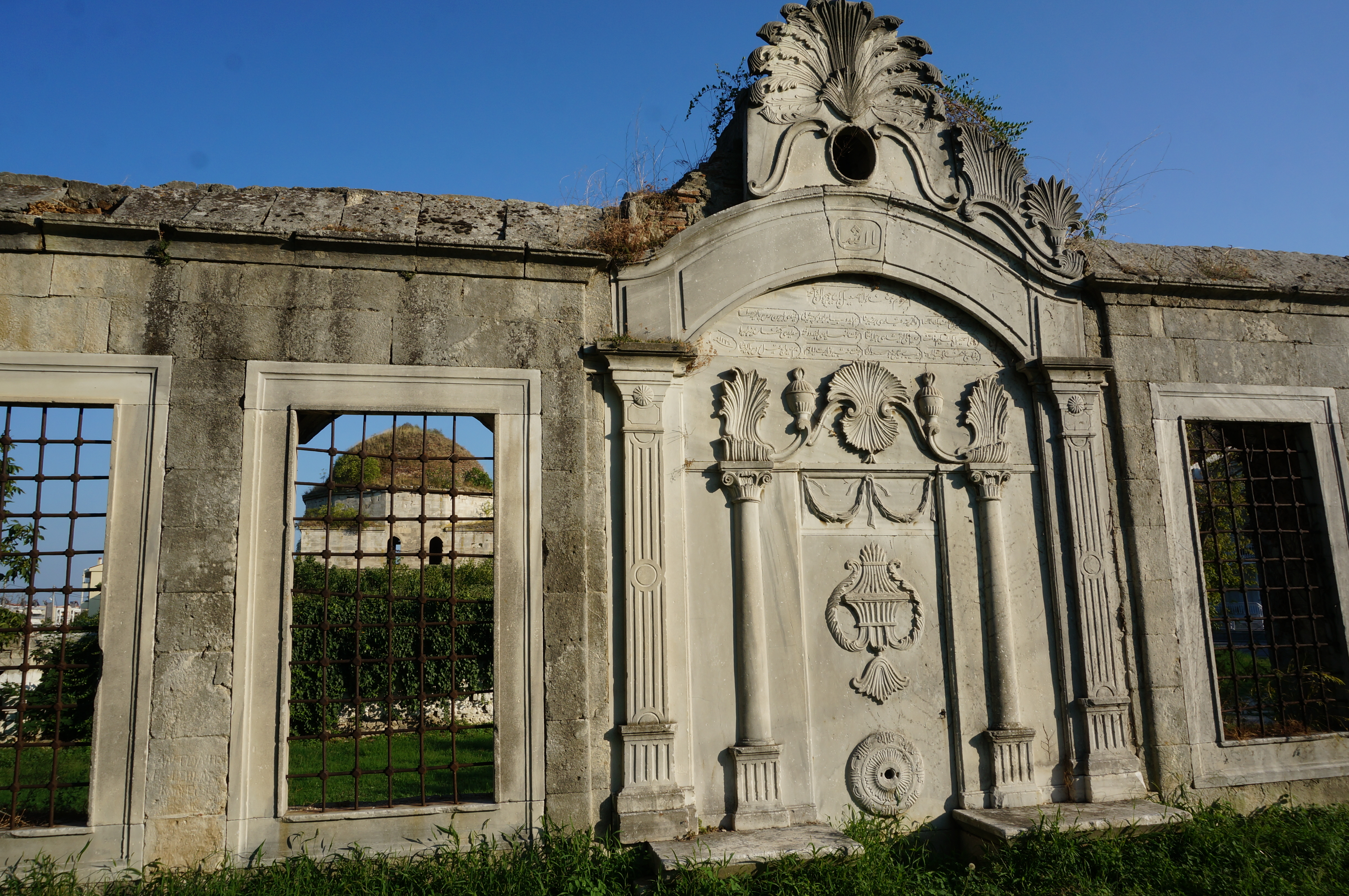 vue de la mosquée de Serrès.